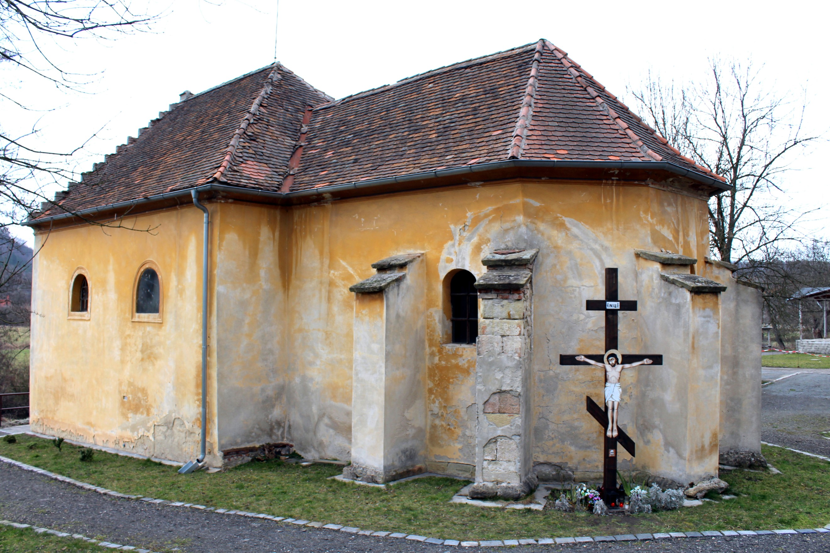 Debř, pravoslavný kostel sv. Barbory